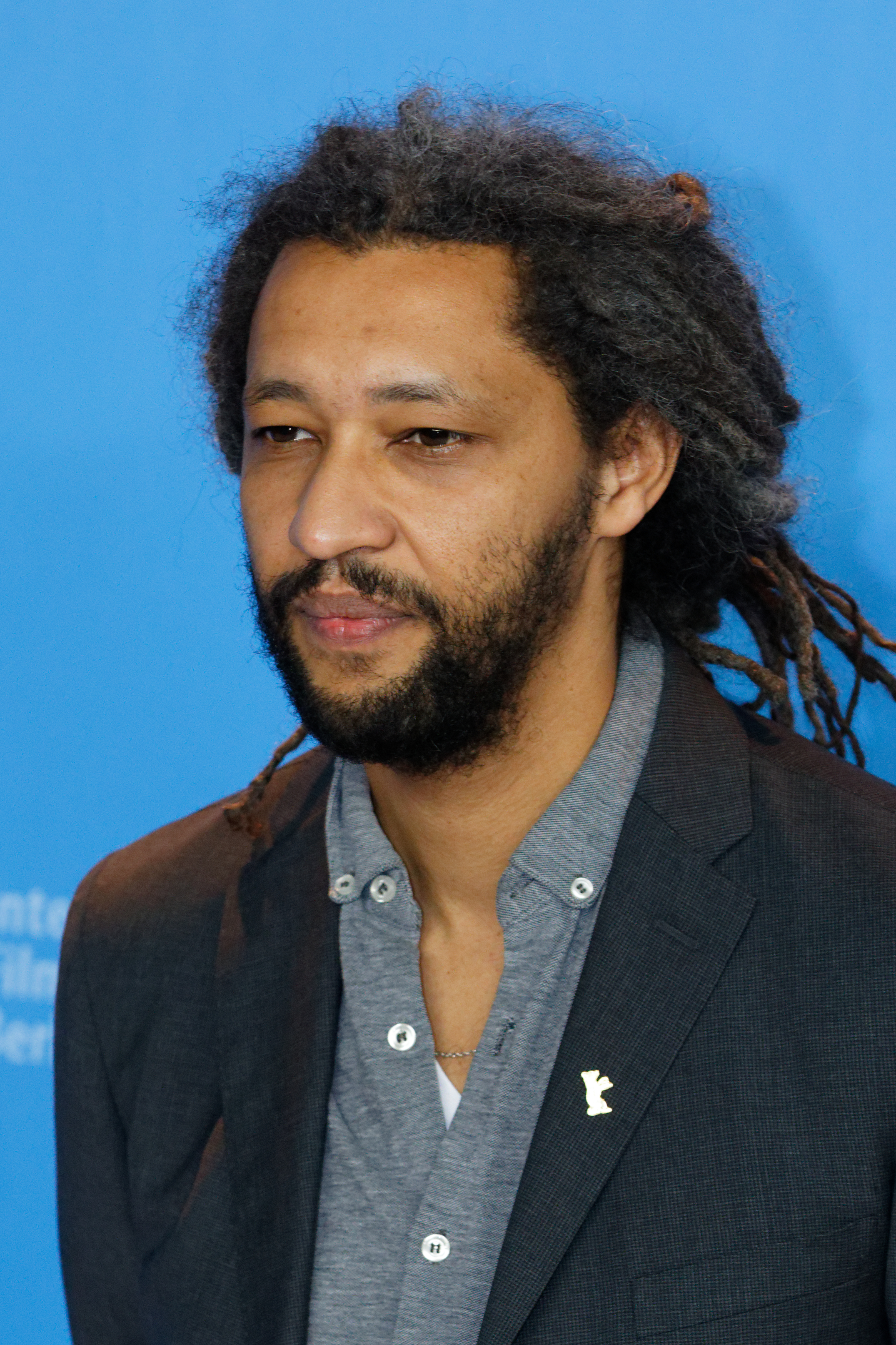 Alain Gomis beim Photo Call zu Félicité bei der Berlinale 2017